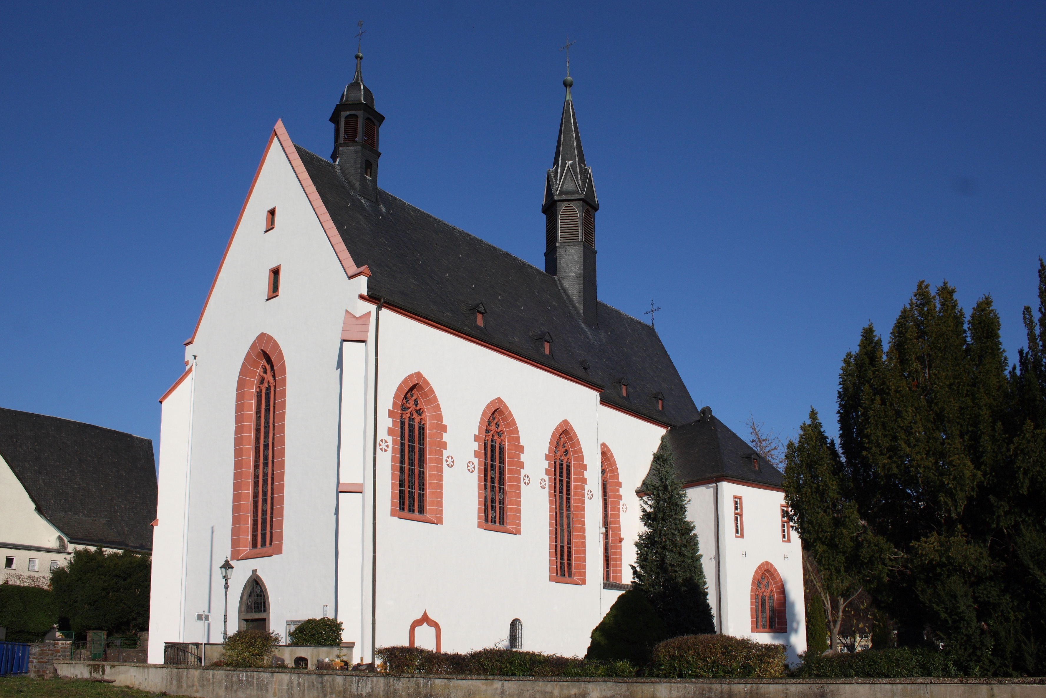 Katholische Filialkirche, ehemalige Klosterkirche St. Georg in Niederwerth im Landkreis Mayen-Koblenz (Rheinland-Pfalz), Ansicht von Südwesten